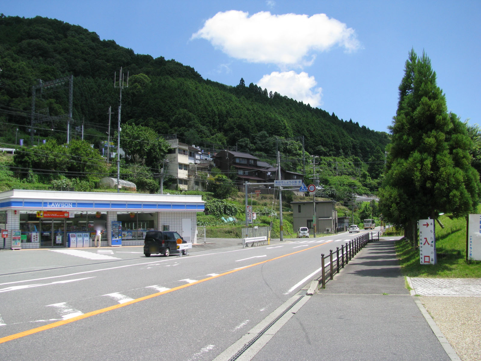 近鉄三本松駅